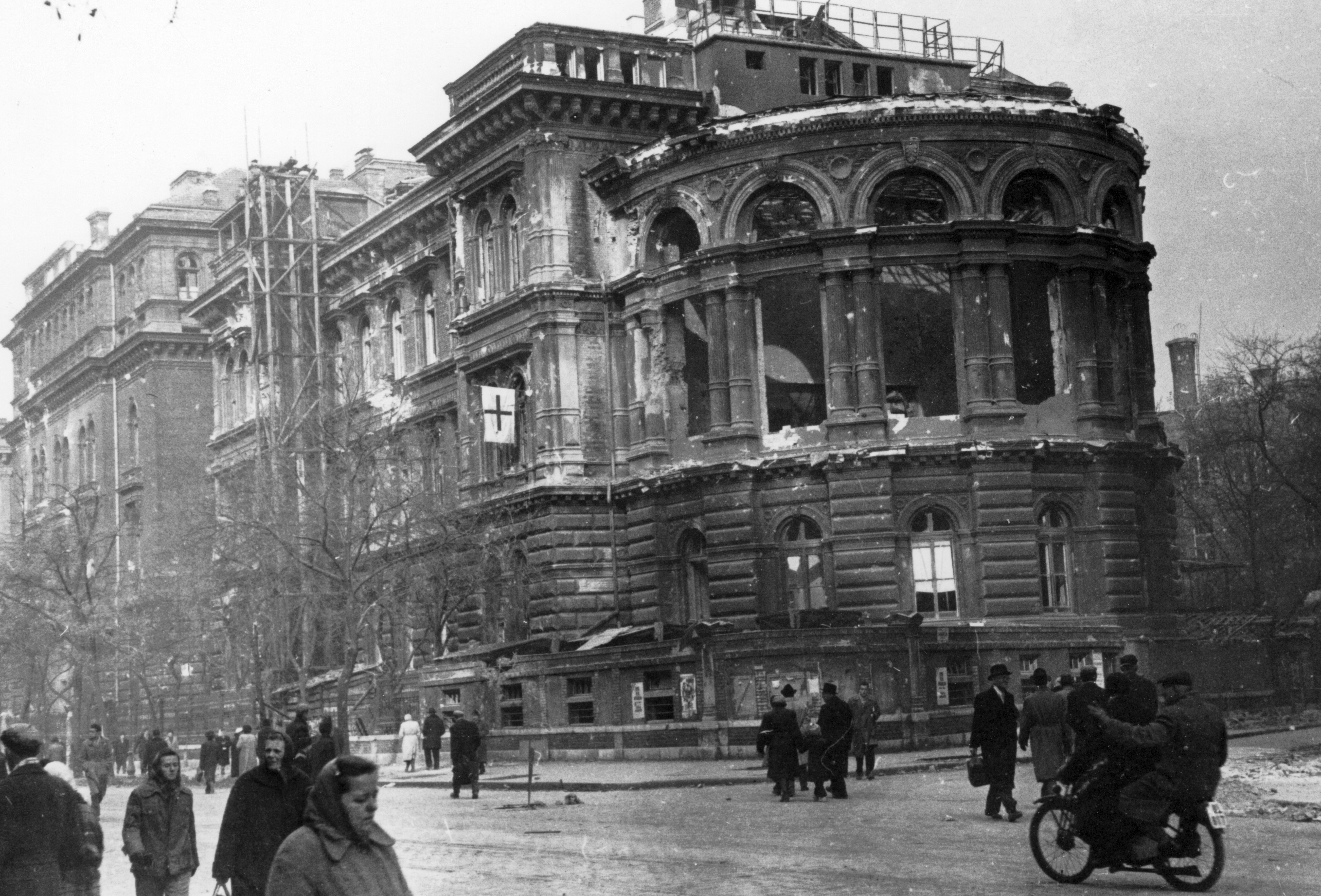 Üllői út - Mária utca sarok, SOTE (ma Semmelweis Egyetem) Bőrgyógyászati Klinika. Location: Hungary, Budapest VIII. Tags: revolution, street view, damaged building, pedestrian, motorcycle, Budapest Title: Üllői út - Mária utca sarok, SOTE (ma Semmelweis Egyetem) Bőrgyógyászati Klinika.